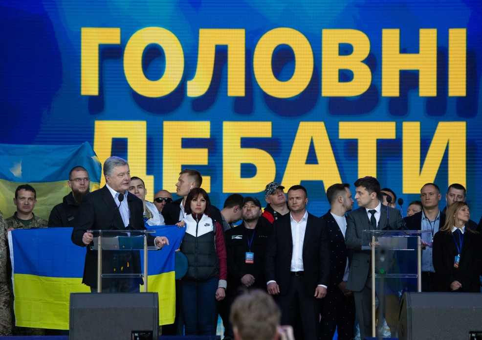 Дебаты кандидатов на пост Президента Украины Петра Порошенко и Владимира Зеленского